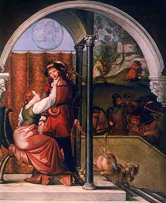 Siegfried's farewell